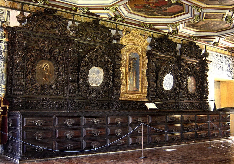 Interior da sacristia do Convento de São Francisco (Olinda), Pernambuco, Brasil.